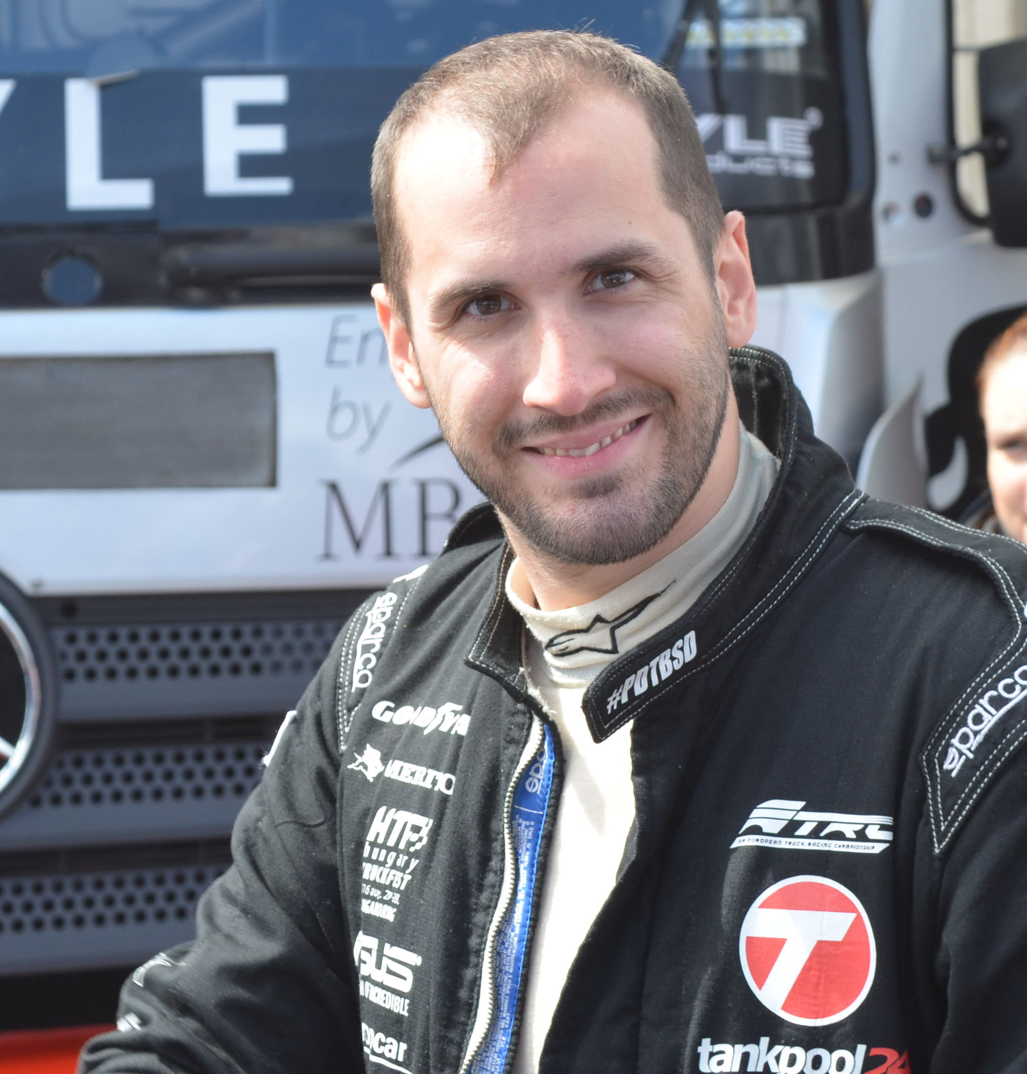 Kiss Norbert a 2016-os Kamion Európa-bajnokság nürbergi futamán.